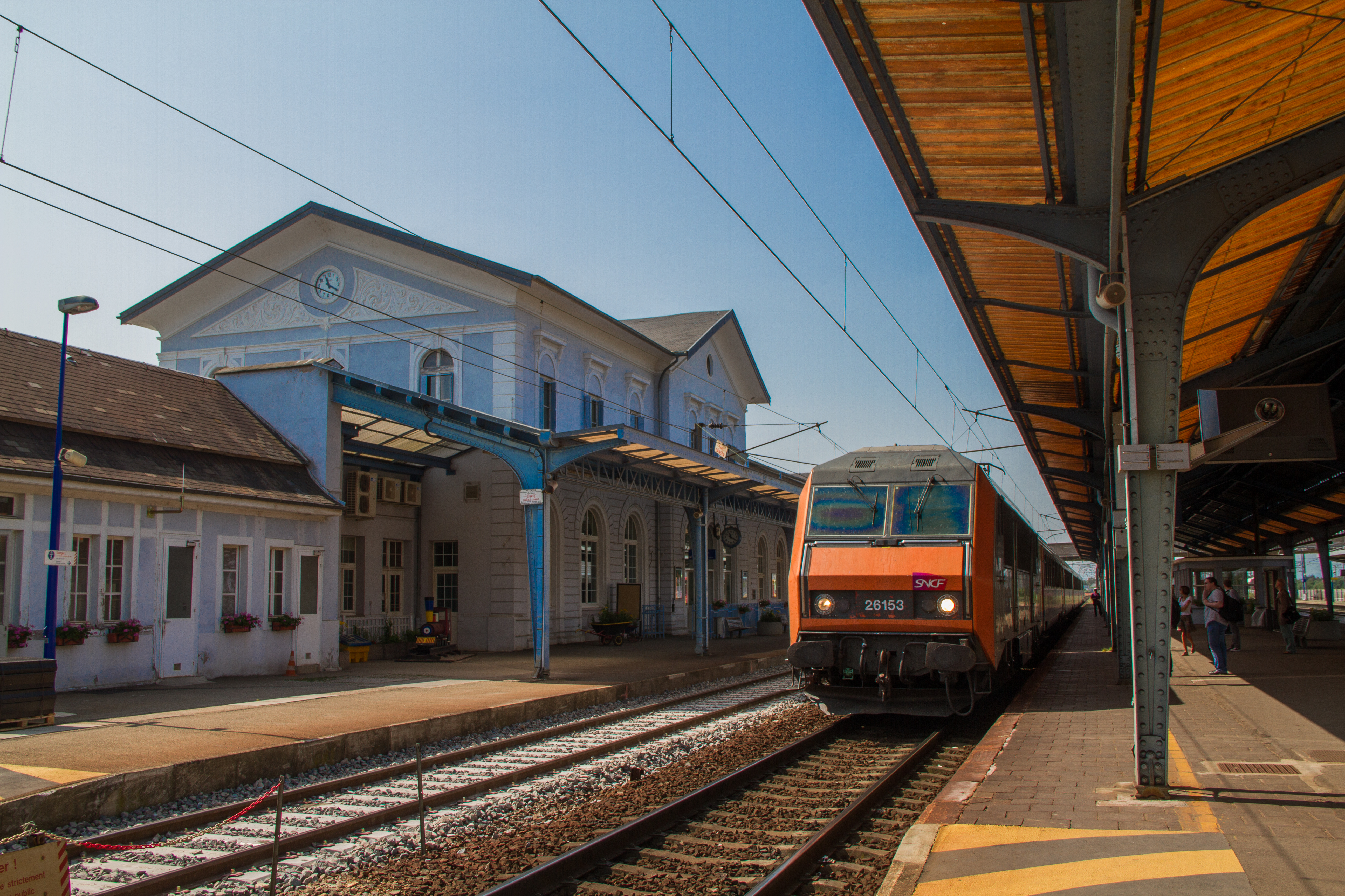 Gare SNCF de Sélestat, arrivée d’un TER Alsace en provenance de Bâle vers Strasbourg.